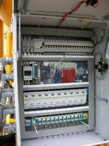 Steuerung einer Flüssigbodenkompaktanlage